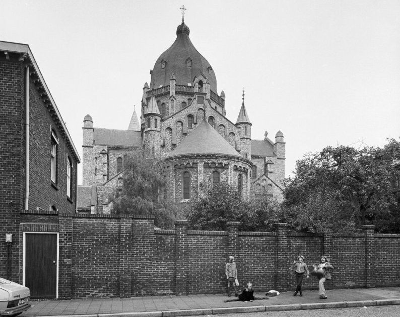 Sint Lambertus Kerk: oostgevel